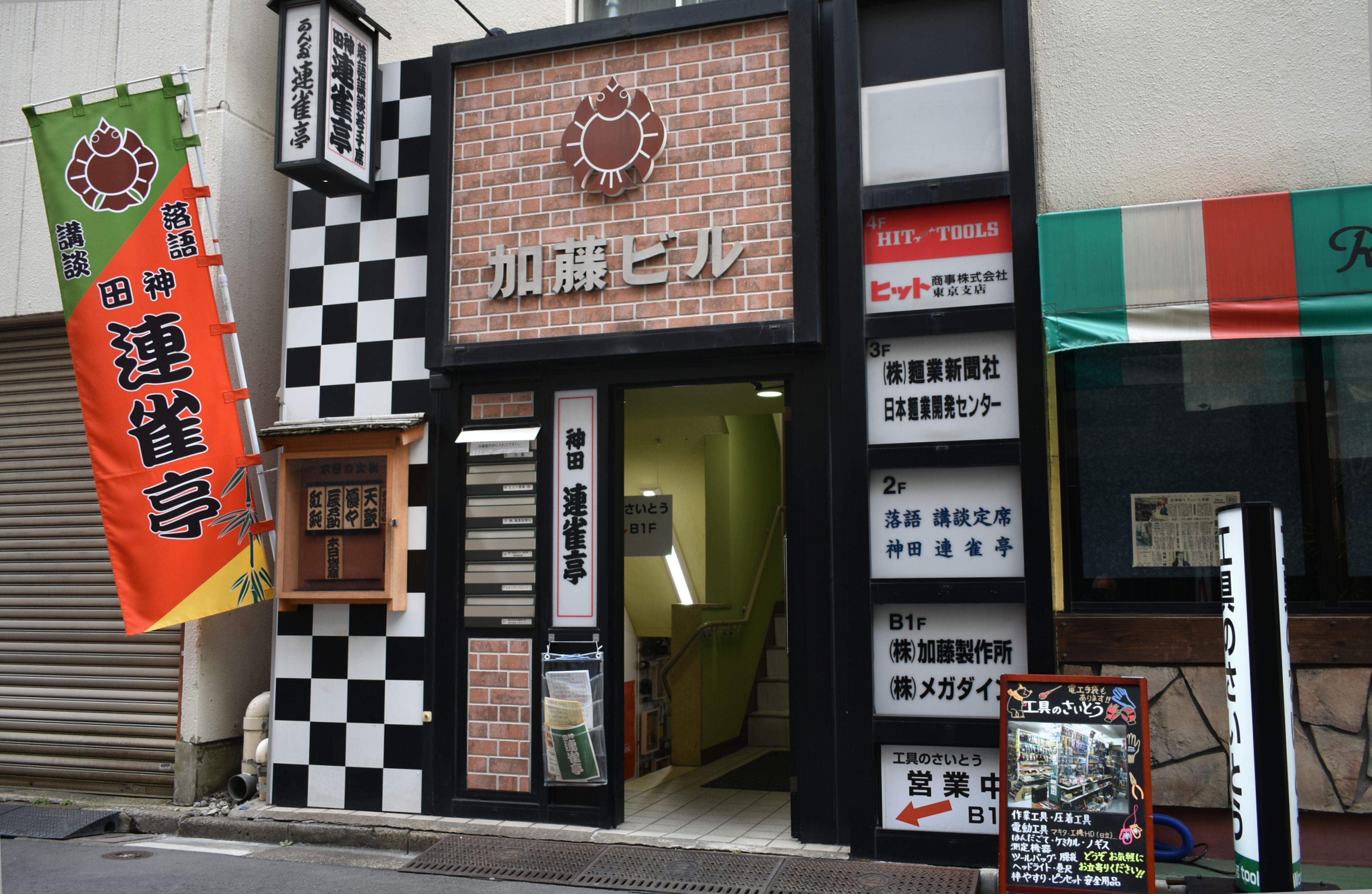 神田連雀亭 Nikon D3400